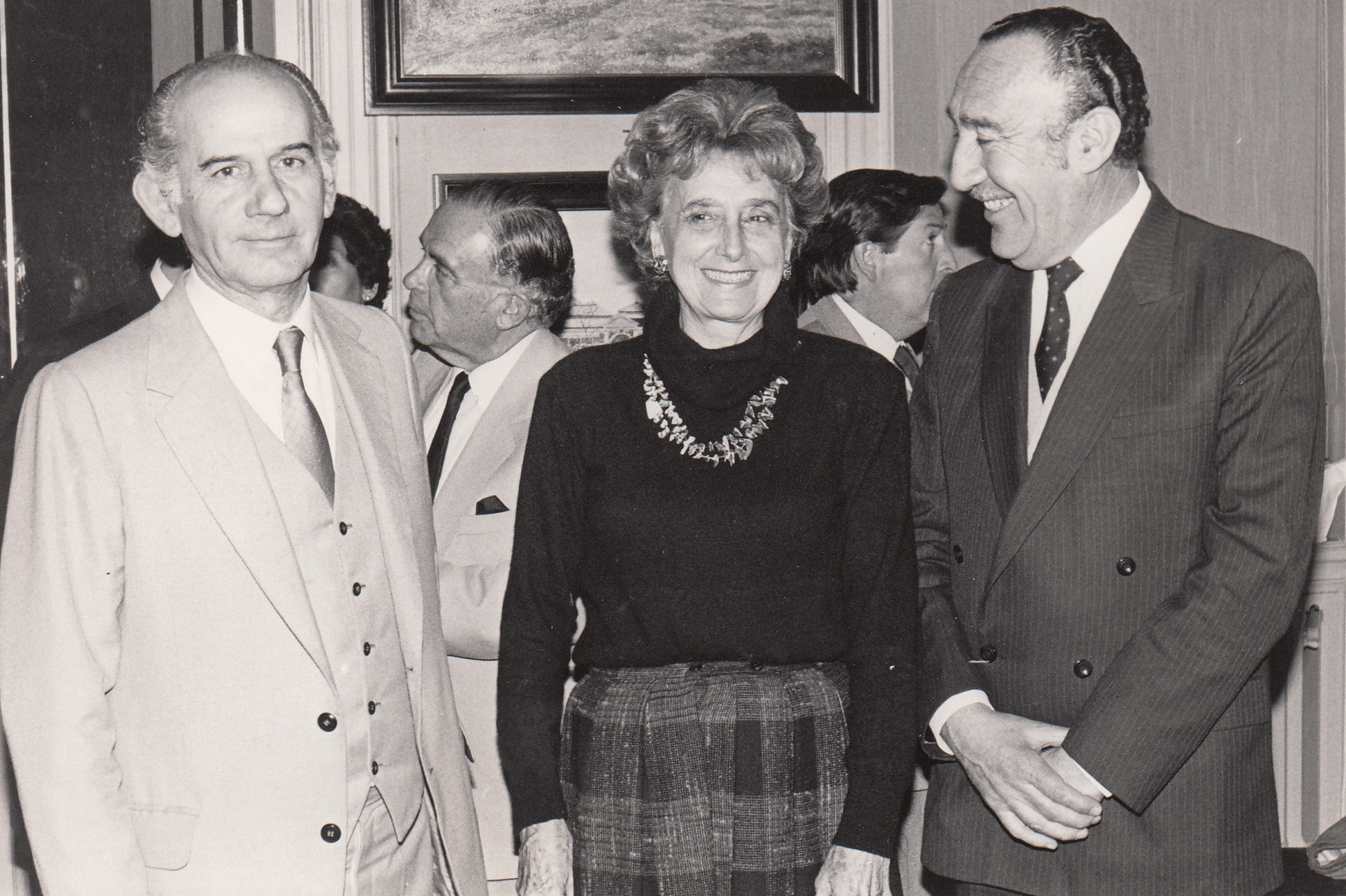 Durante la inauguración de su primera muestra pictórica, abierta del 6 al 23 de agosto de 1986, Eugenio Cruz Vargas aparece junto a Paloma Correa de Bunster, directora del Instituto Cultural de Providencia, donde se exhibió la obra del artista, y José María Palacios, destacado crítico de Arte. Autor de la fotografía: José Cruz, quien en calidad de autor y propietario titular de la misma otorgó el consentimiento para publicar y difundir en la red internet esta imagen bajo las condiciones que establece la Licencia de Uso Creative Commons, Atribución-Compartigual 3.0 Unported (CC BY-SA 3.0).